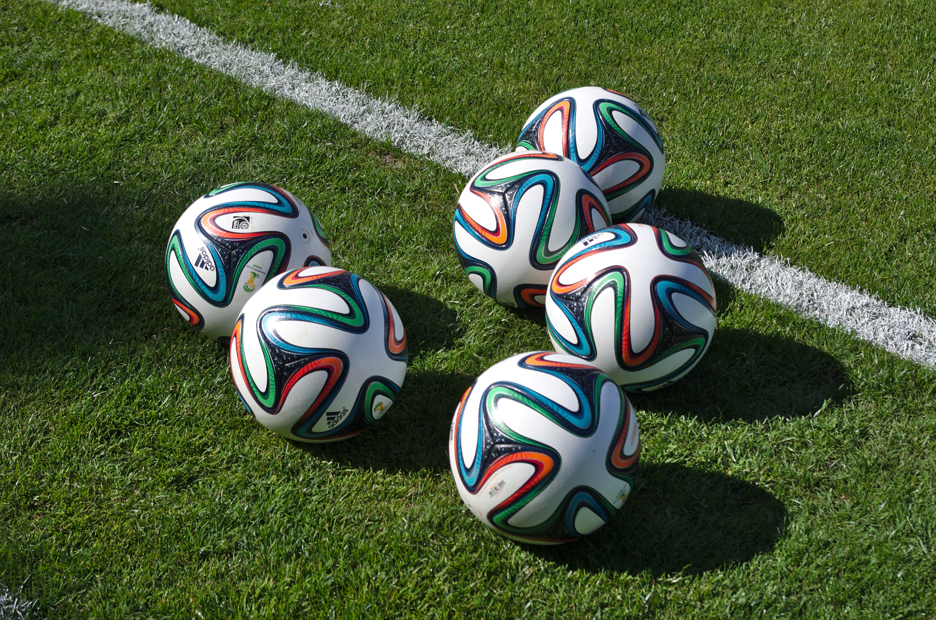 Algérie - Arménie - 20140531 - Ballons